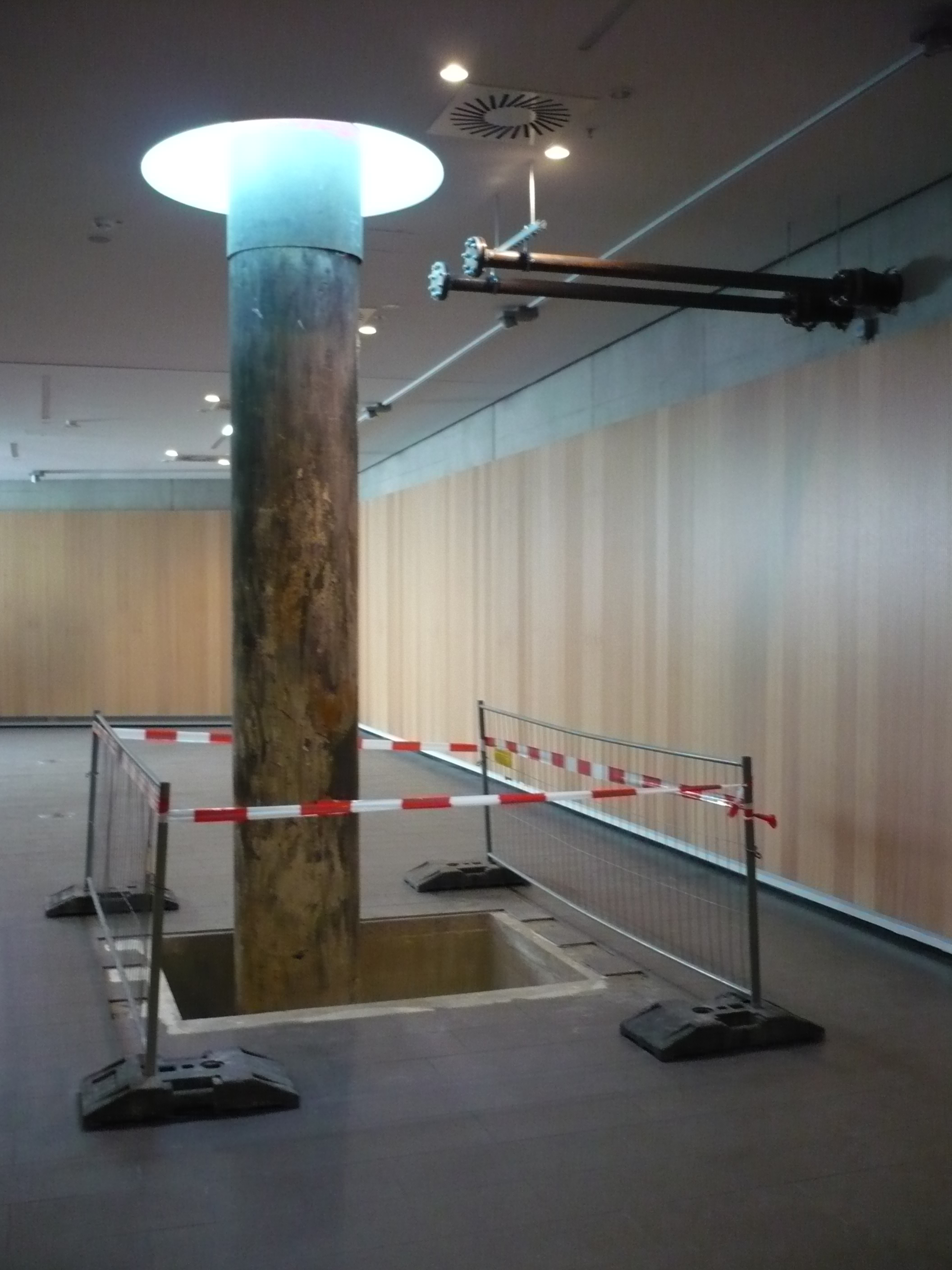 Sogenanntes "Super C", Gebäude der RWTH in Aachen, Schacht der Geothermiebohrung mit Dachfenster zum Vorplatz